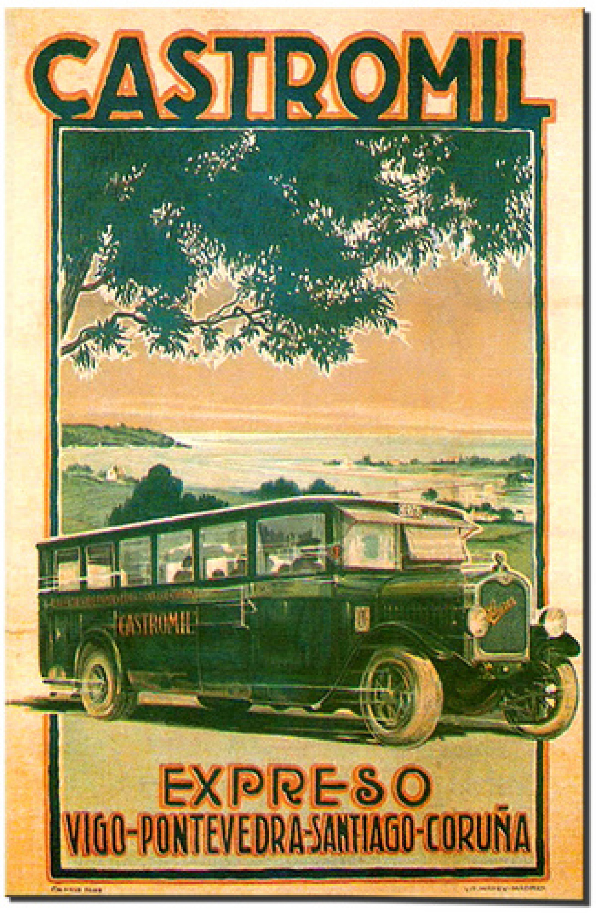 Cartel de Camilo Díaz Baliño para publicidade do Castromil.